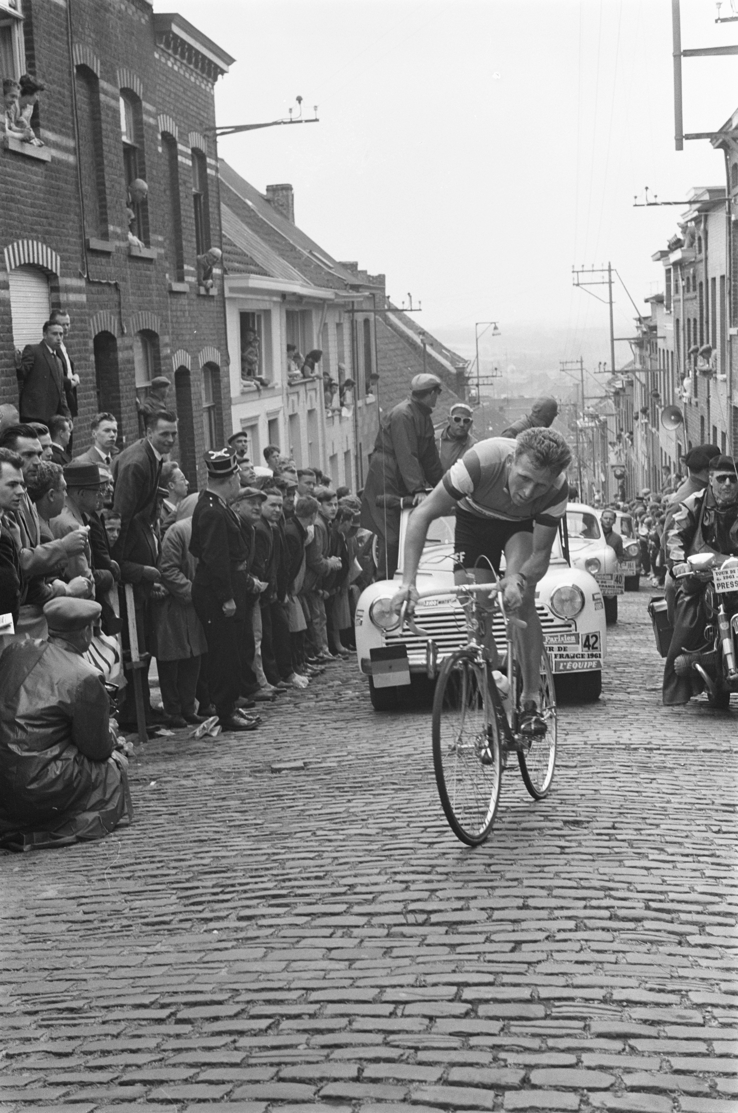 Nationaal Archief Beschrijving: Jaap Kersten tijdens de klim in Geraardsbergen, Tour de France 1961 Datum: 23 juni 1961 Bestanddeelnummer 912-6734 Vervaardiger: Anefo / Harry Pot (1929–1996) DescriptionDutch photographer and cinematographerDate of birth/death 1929 1996Work location Amsterdam, BentveldAuthority control : Q27877051 VIAF: 284191334 ISNI: 0000 0003 9050 874X Koninklijke: 073478326 creator QS:P170,Q27877051 URL: Voor meer informatie over het Nationaal Archief: Voor meer foto's uit deze en andere collecties, bezoek onze Beeldbank:, U kunt ons helpen onze kennis van de fotocollecties te verrijken door tags en commentaren toe te voegen. Herkent u mensen of locaties of heeft u een bijzonder verhaal te vertellen bij één van de foto's, laat dan een reactie achter (als u ingelogd bent bij Flickr) of stuur een mailtje naar